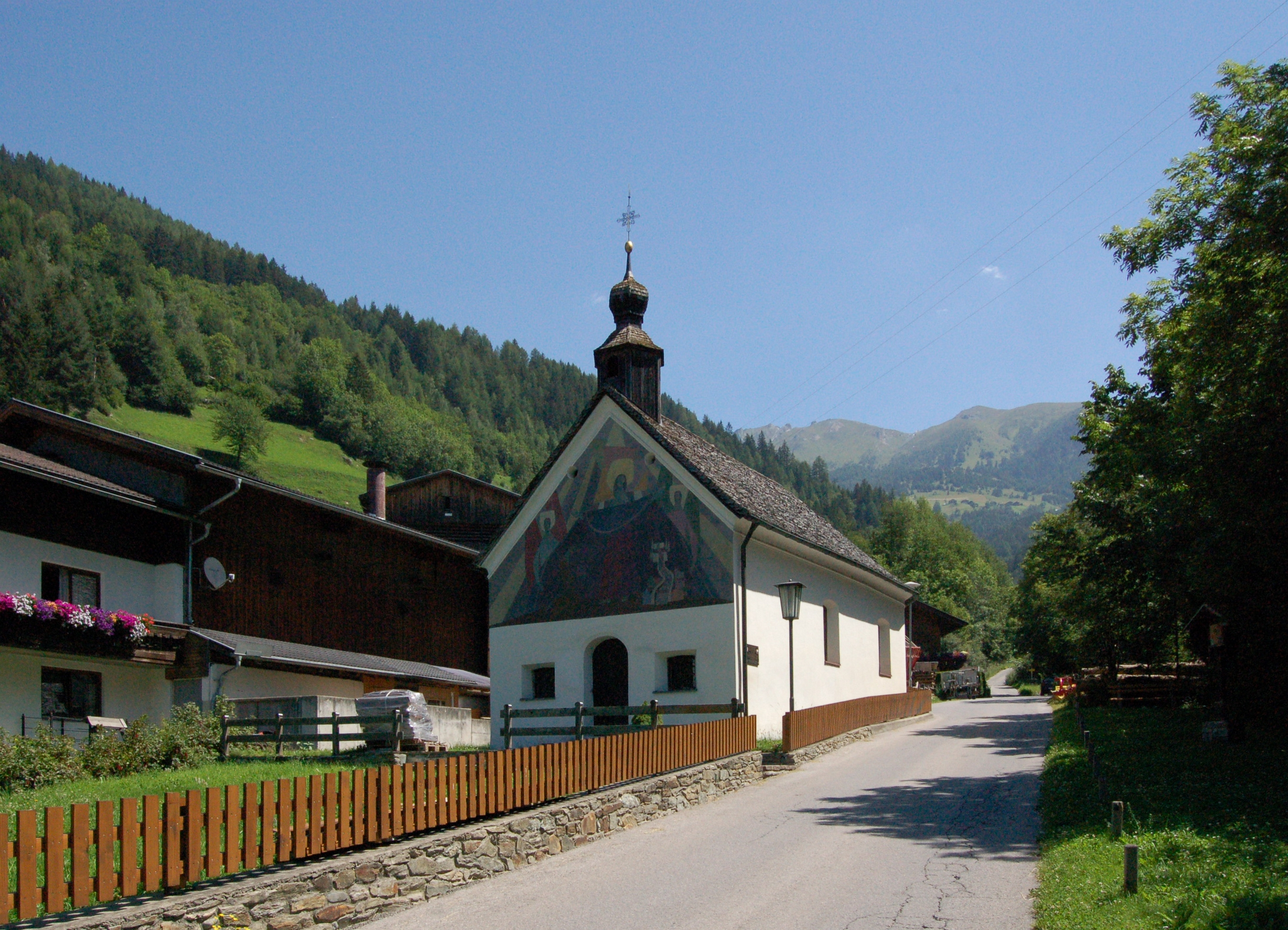 Die Bachkapelle in Matrei-Markt (Gemeinde Matrei in Osttirol